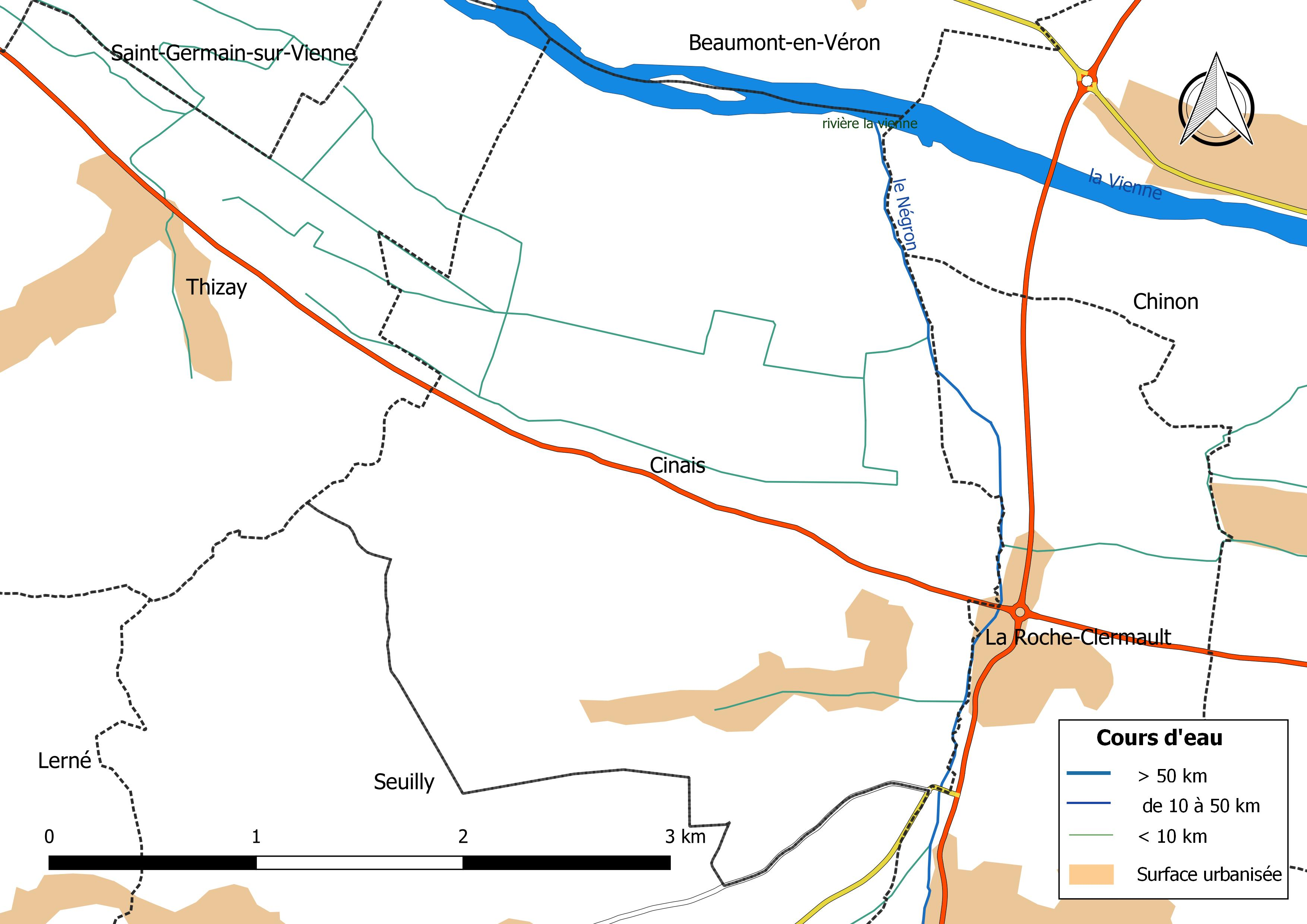 Carte du réseau hydrographique de la commune de Cinais (France).